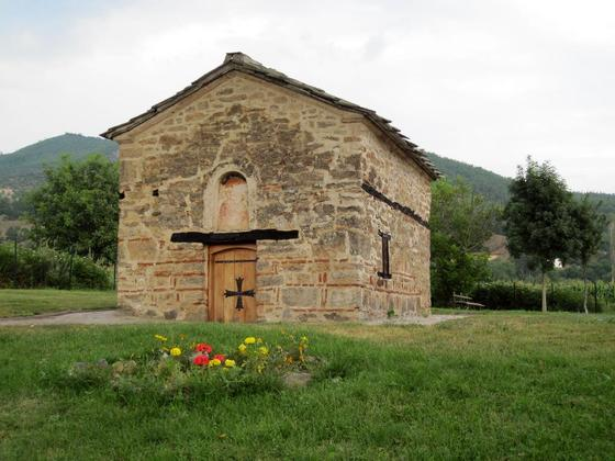 Црква Св. Богородица Пречиста, нарекувана Ќелија, село Велмеј, охридско, Македонија